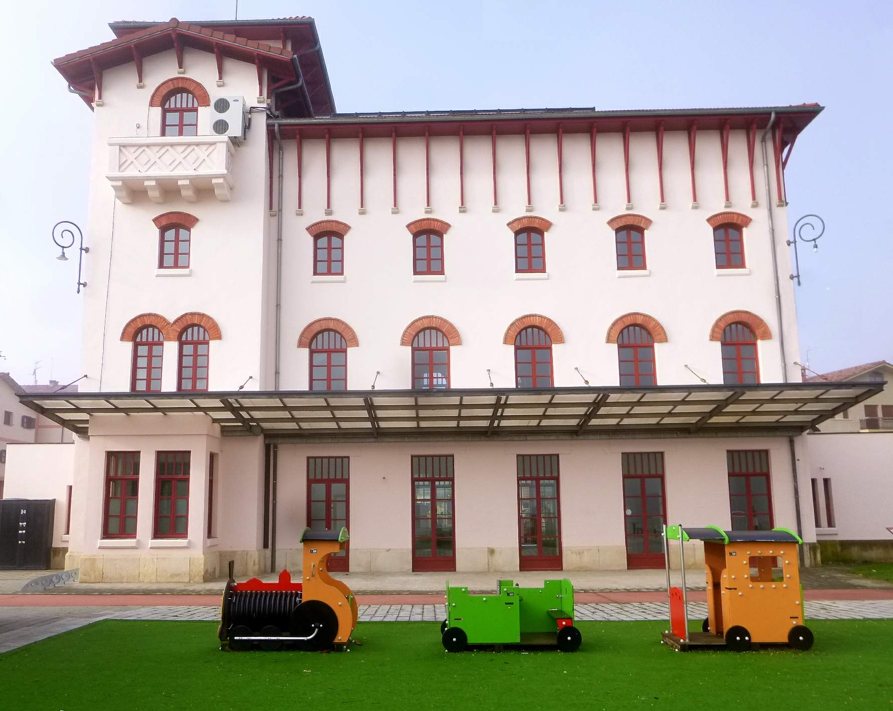 Ayuntamiento de Arraya-Maestu (Álava). El edificio fue la estación de Maestu del desaparecido Ferrocarril Vasco-Navarro